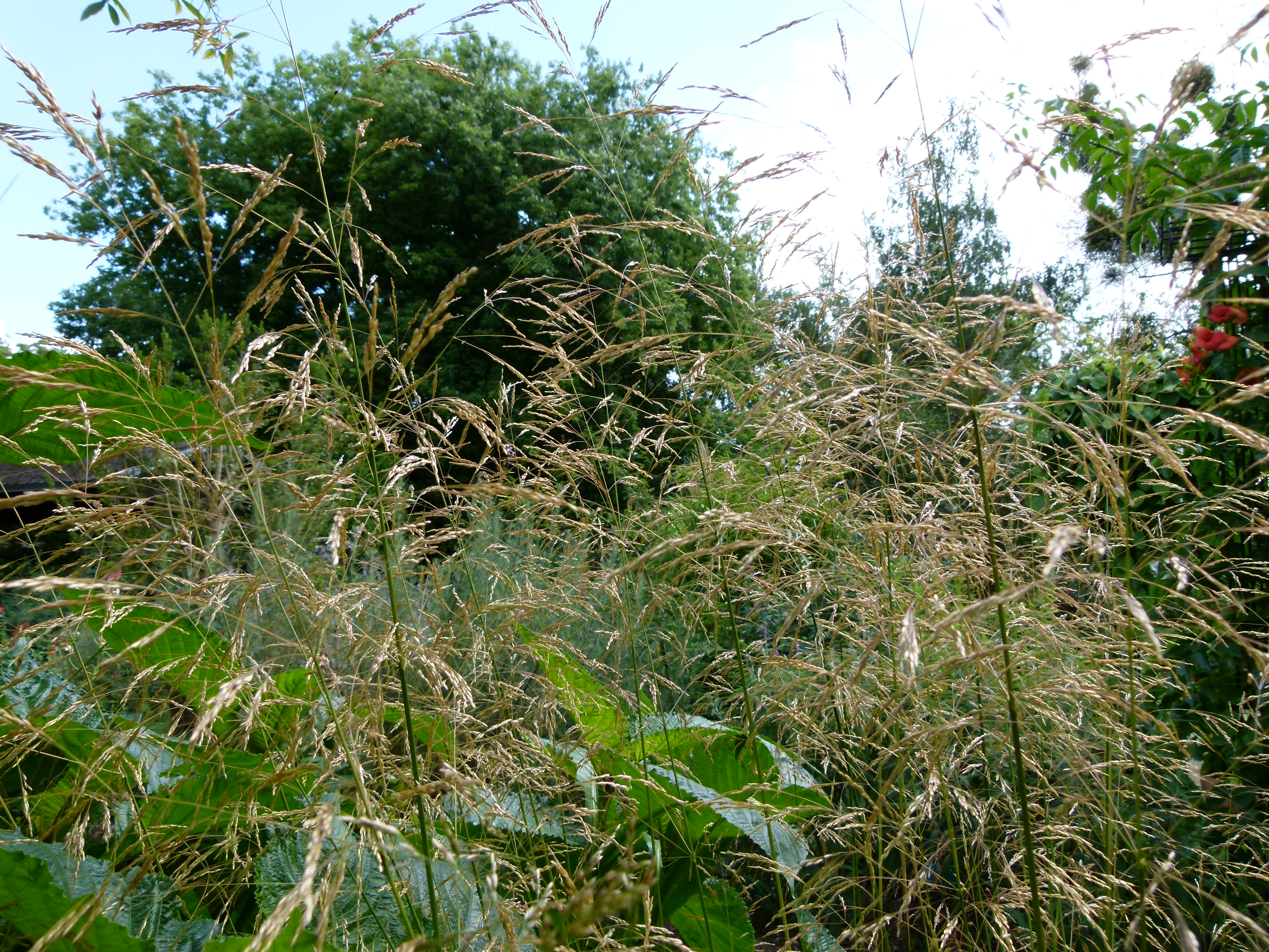 Deschampsia cespitosa